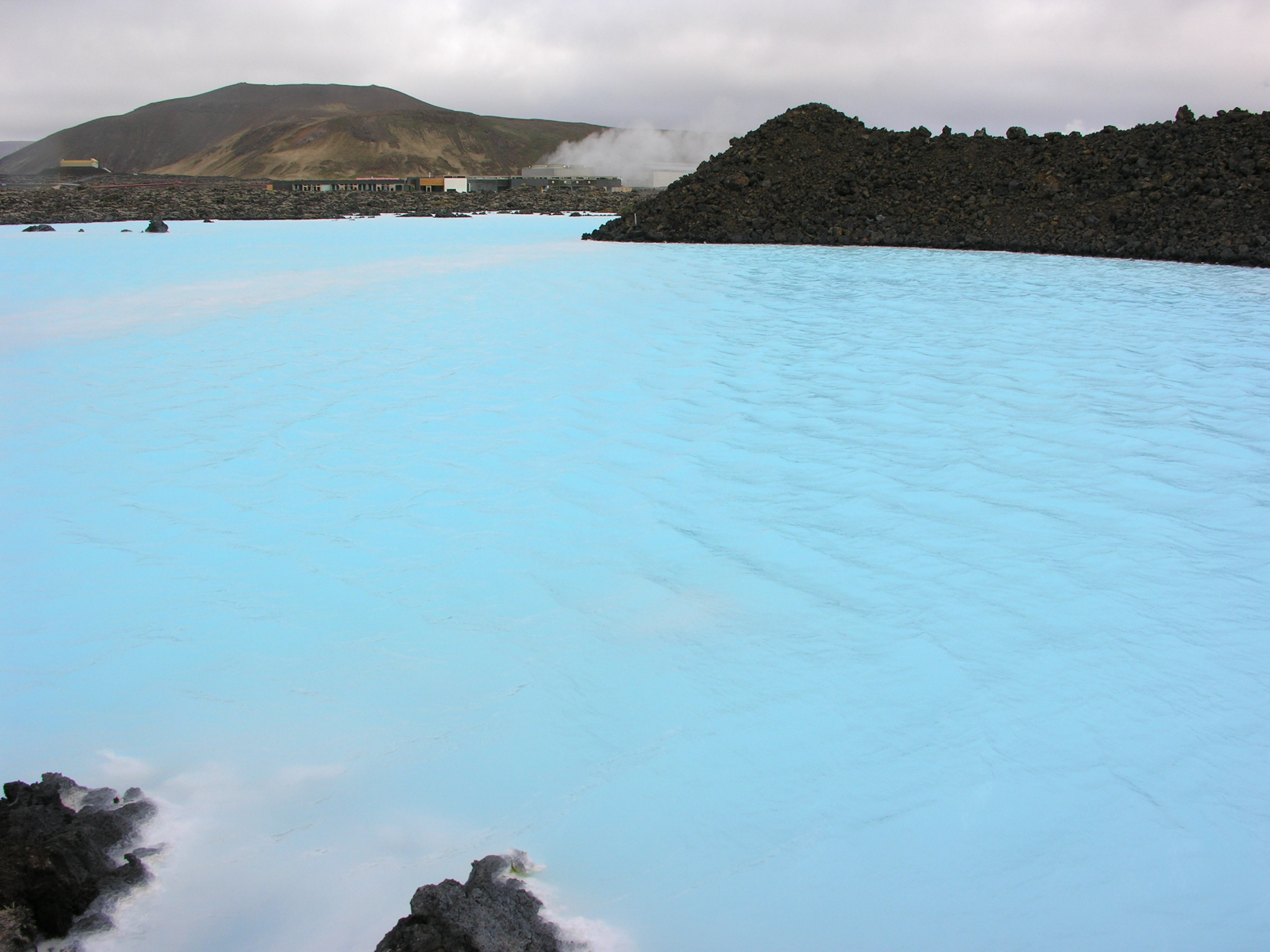 Iceland, Blue Lagoon